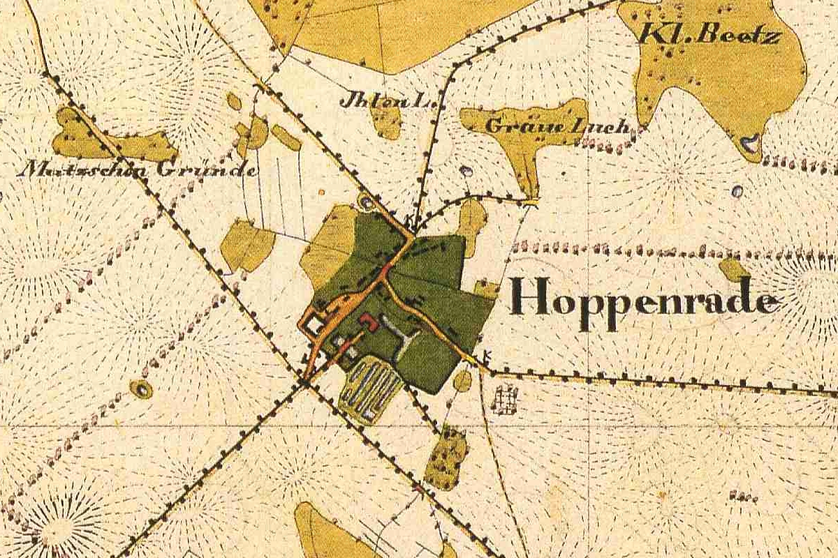 Karte von Hoppenrade, Kreis Ruppin, Provinz Brandenburg, 1825